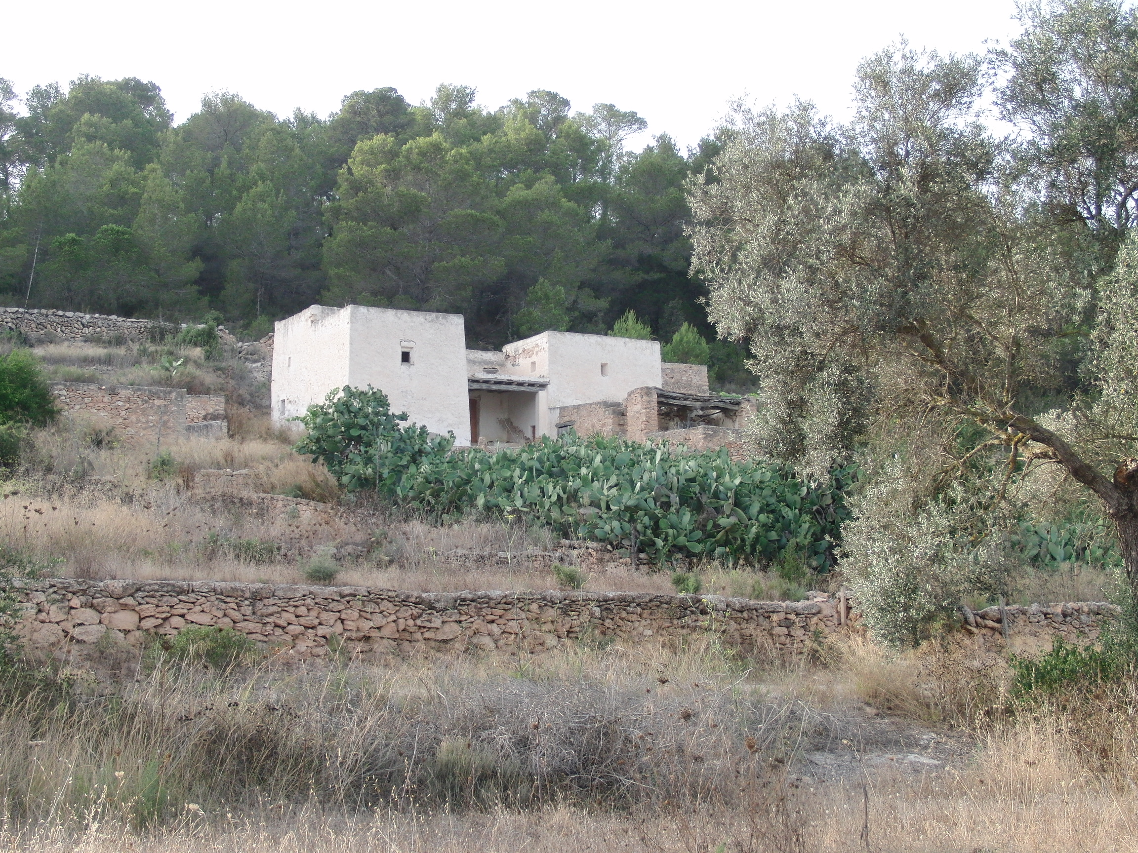 Finca 'Can Frare Verd' - Ibiza, Balearen. Typischer traditioneller Baustil eines ca. 300 Jahre alten Bauernhauses.